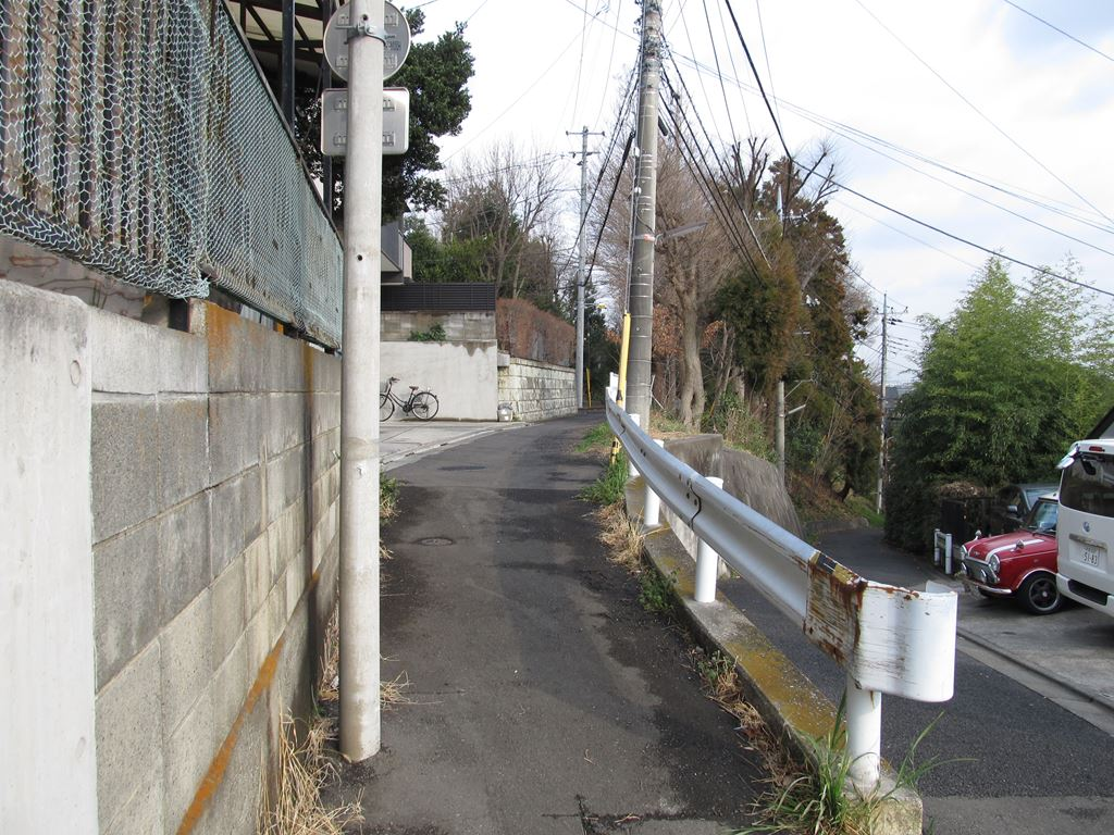 はけ（崖）の道